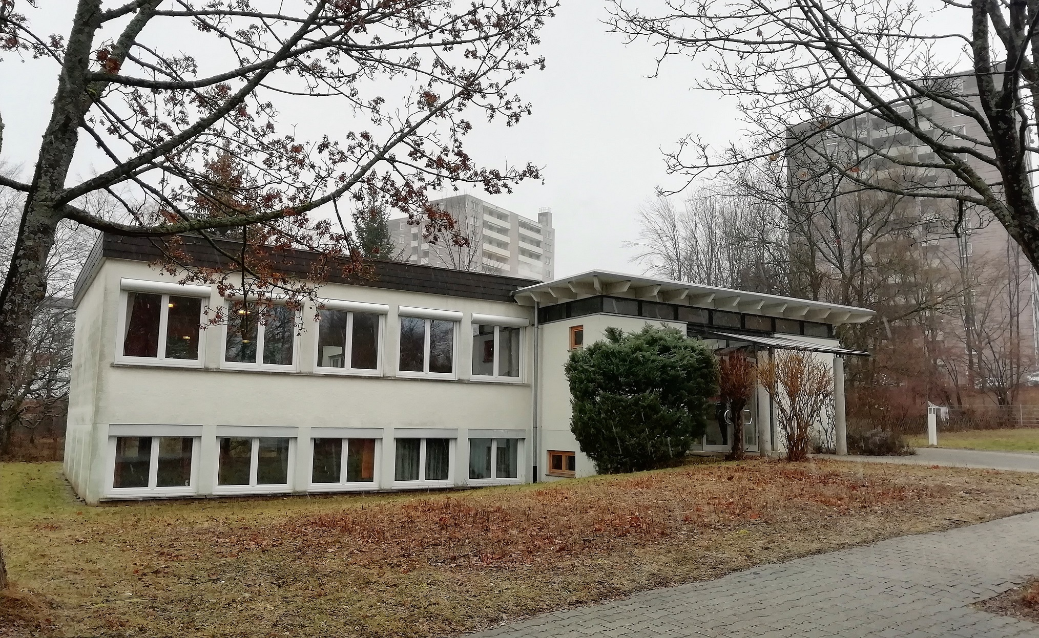 Sondelfingen Rangenbergstraße